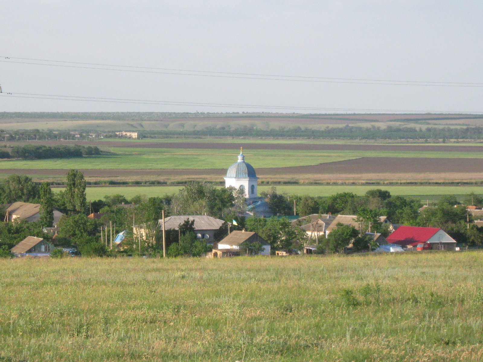 с.Василівка. У центрі панорами церква Різдва Христового